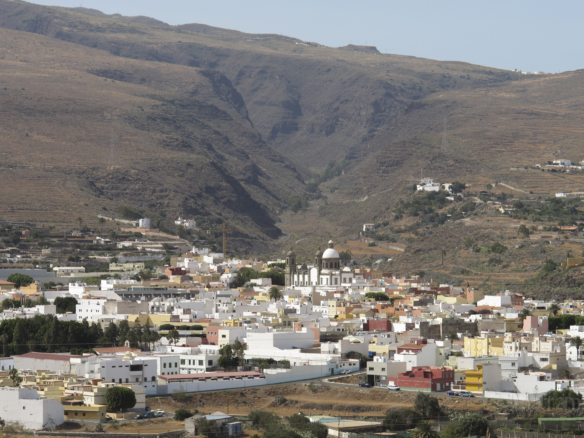 Panorámica de la villa de Agüimes, en la provincia de Las Palmas (España)